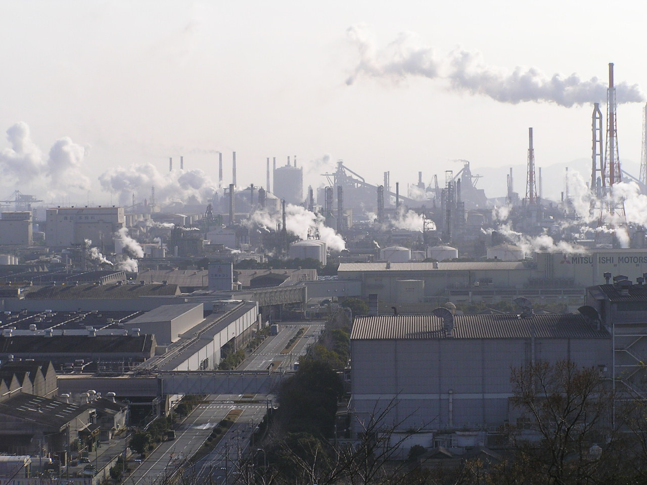 mizushima kombinat